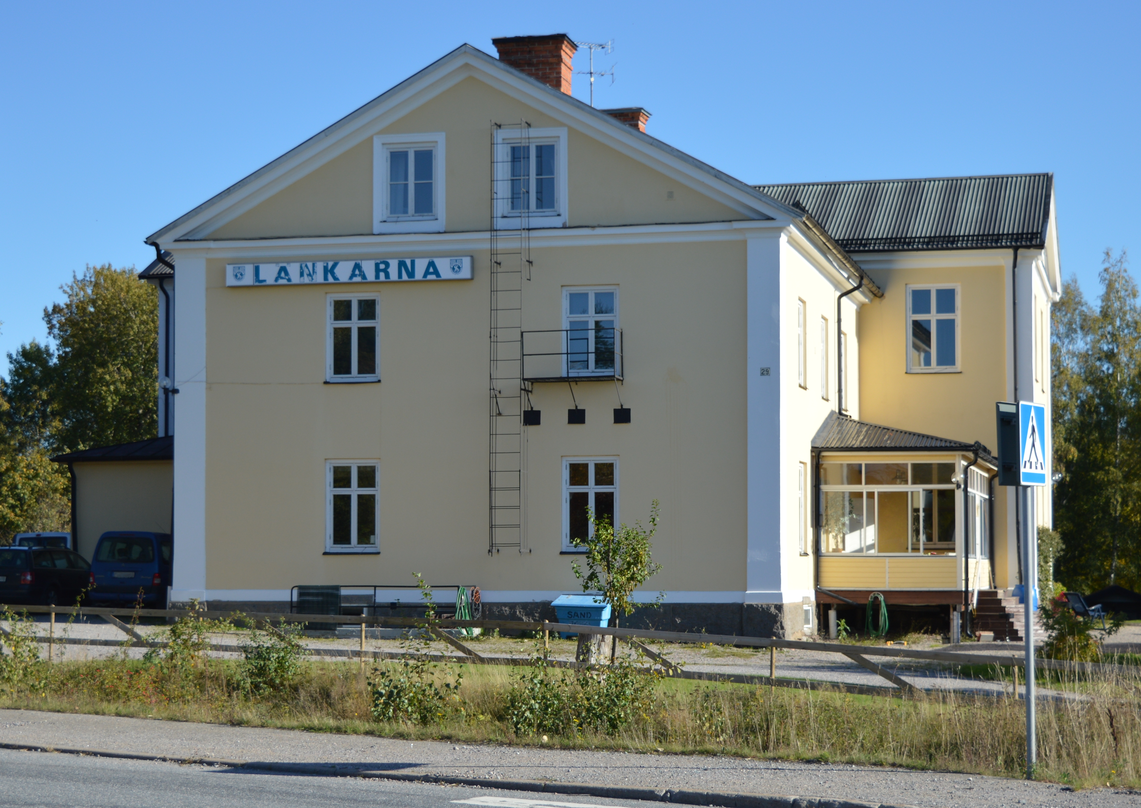 Länkarna lokal i Roxnäs i Torshälla, Eskilstuna kommun.